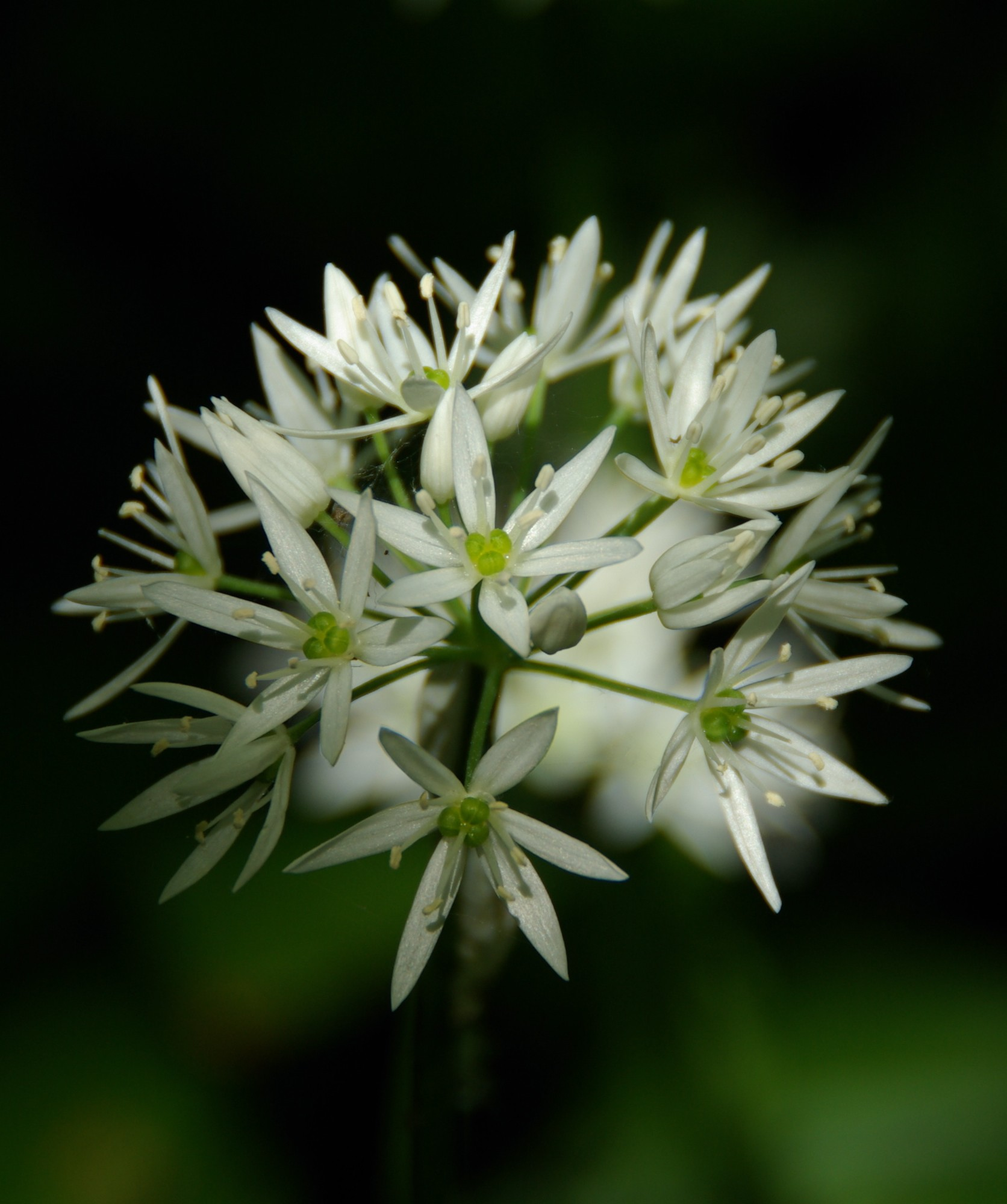 Karulauk on 15-40cm kõrgune mitmeaastane rohttaim,õitseb mais ja juunis.Kasvab looduslikult salumetsades.Pildistatud Läänemaal Puhtus